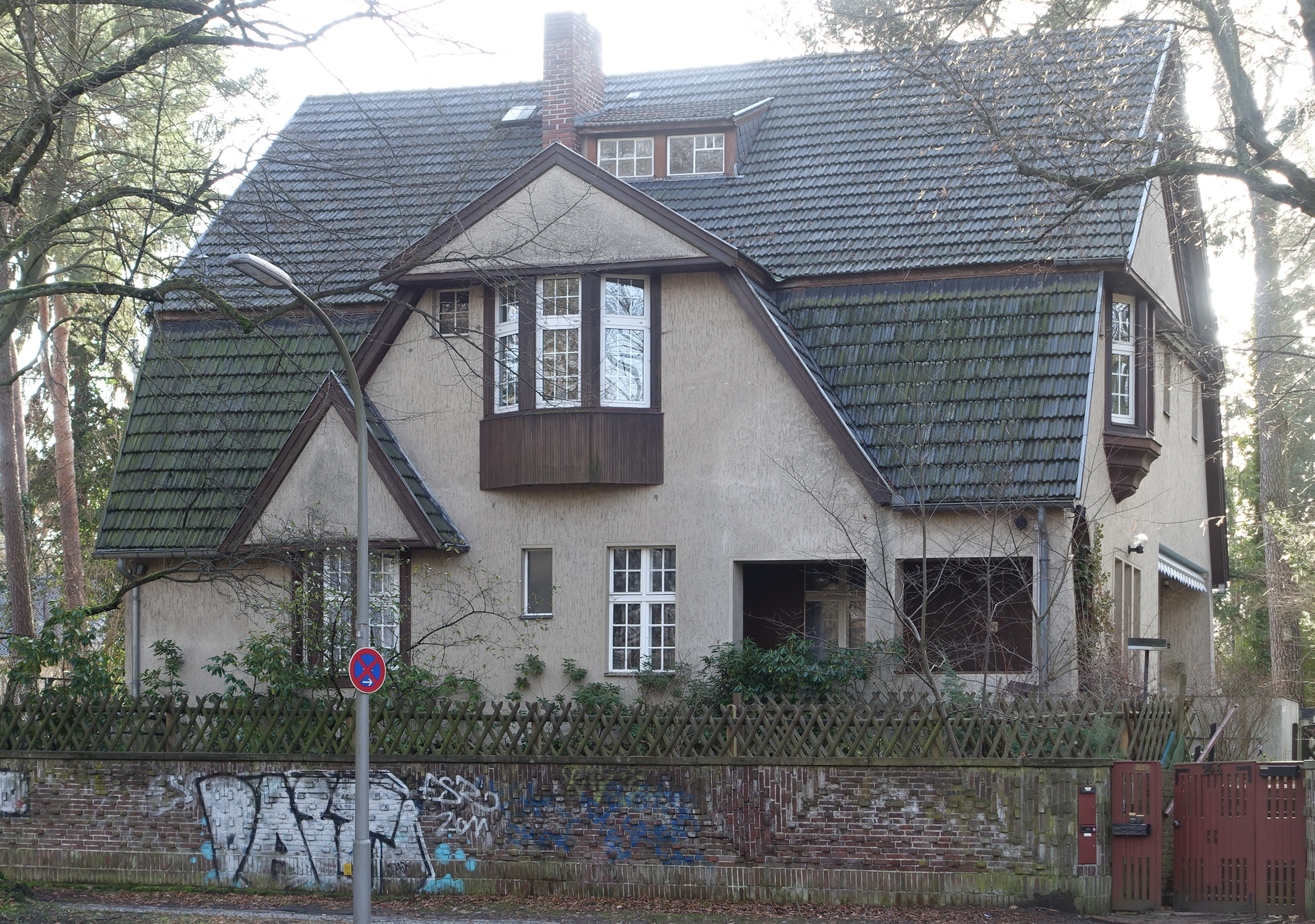 Wohnhaus